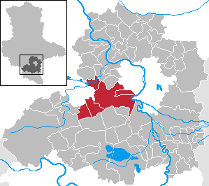 Verwaltungsgemeinschaft Würde/Salza in Sachsen-Anhalt - Saalekreis